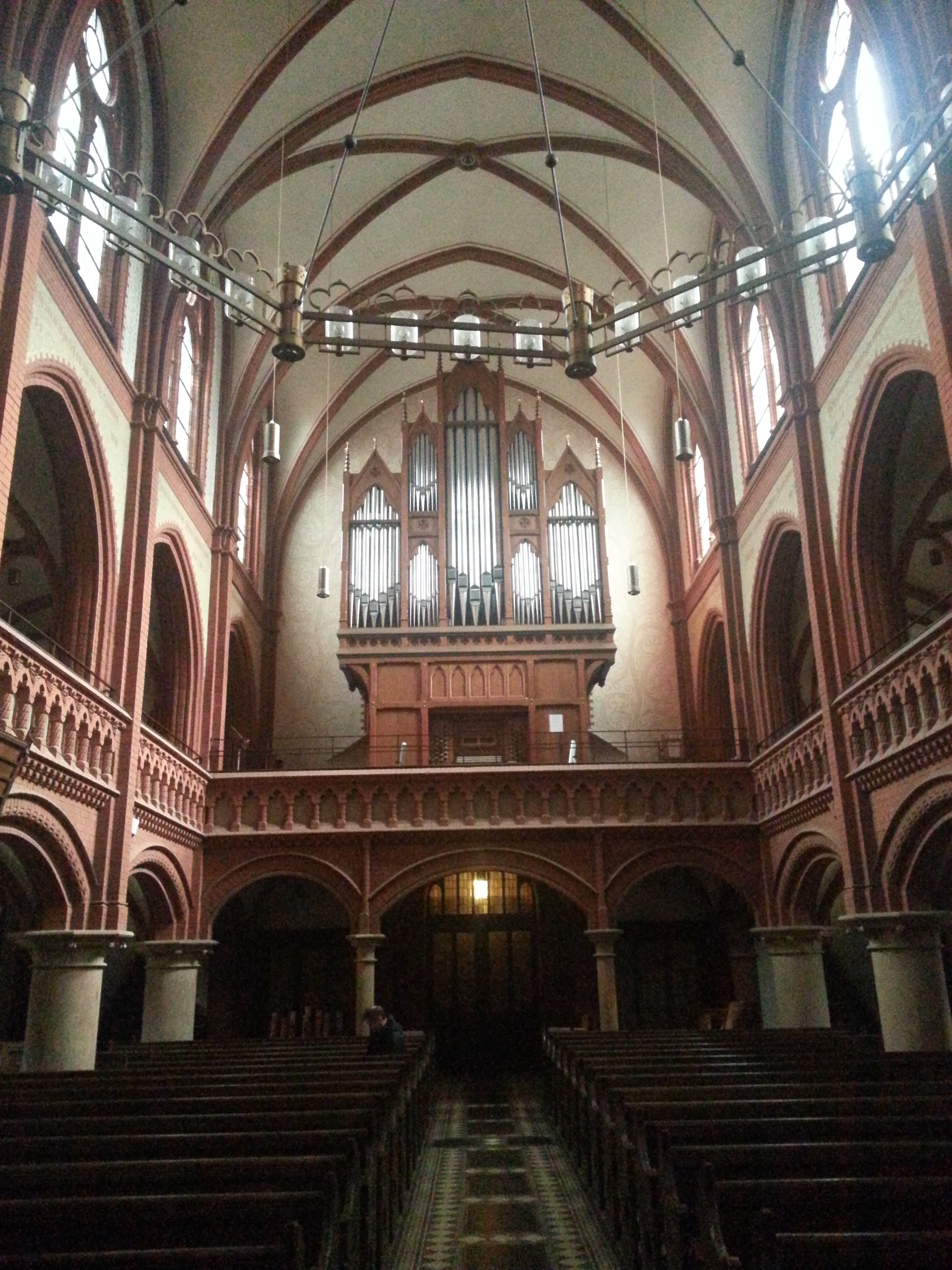 Die Hillebrand-Orgel der Dreifaltigkeitskirche in Hannover